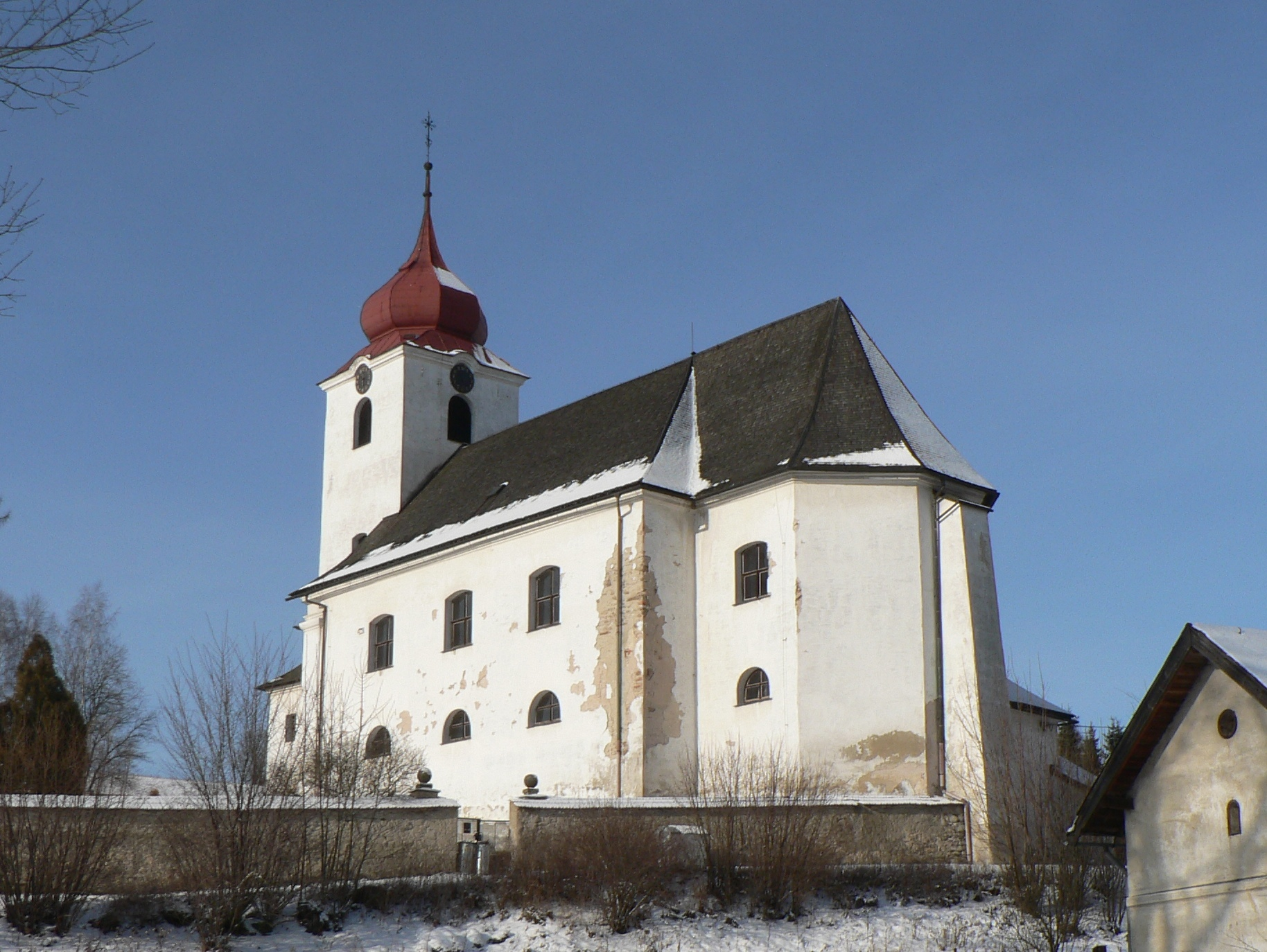 Kostel Nanebevzetí Panny Marie (Malá Morava)